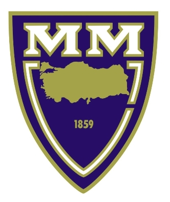 Mülkiyeliler Birliği Logo